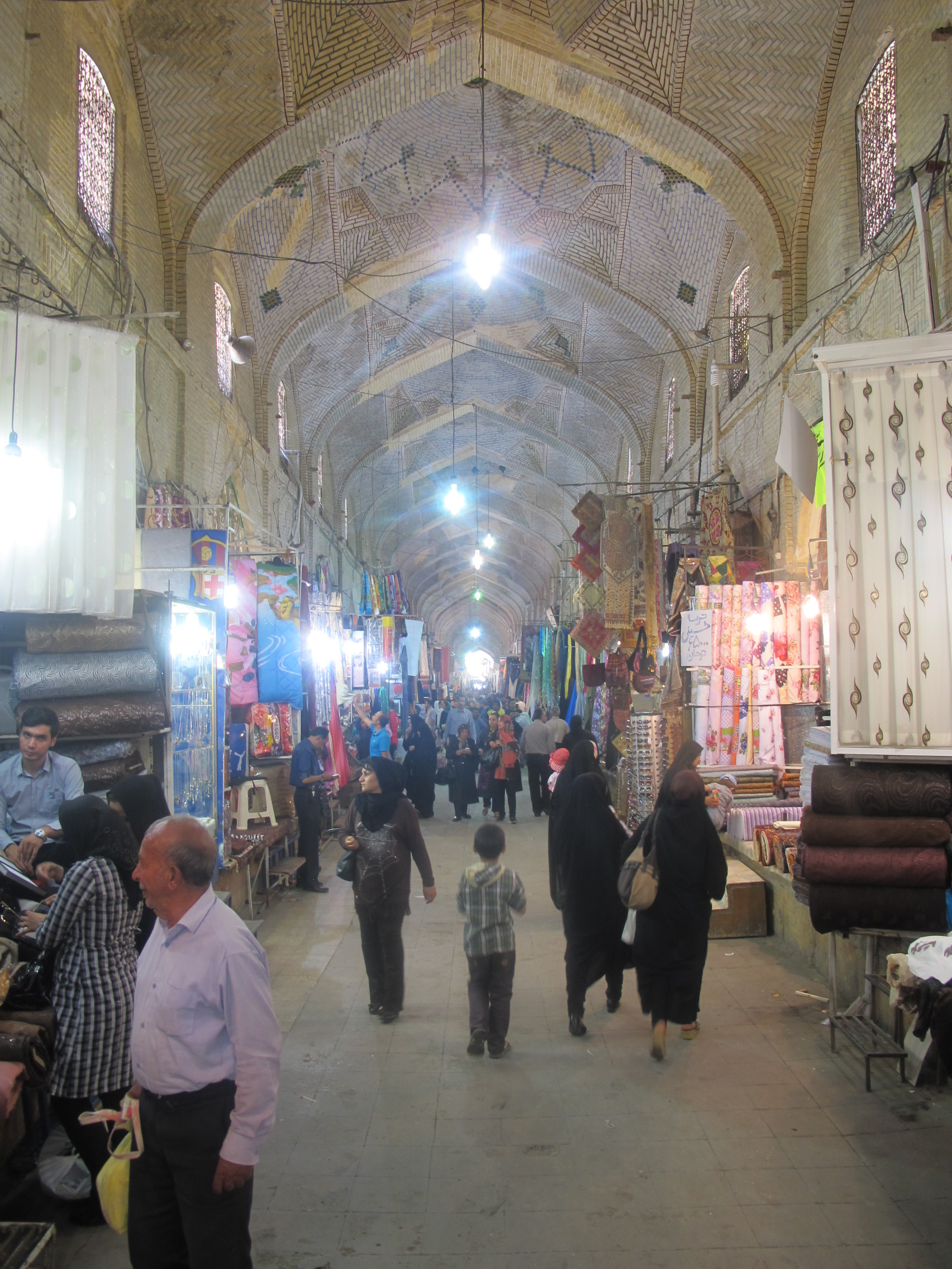 bazar vakil shiraz